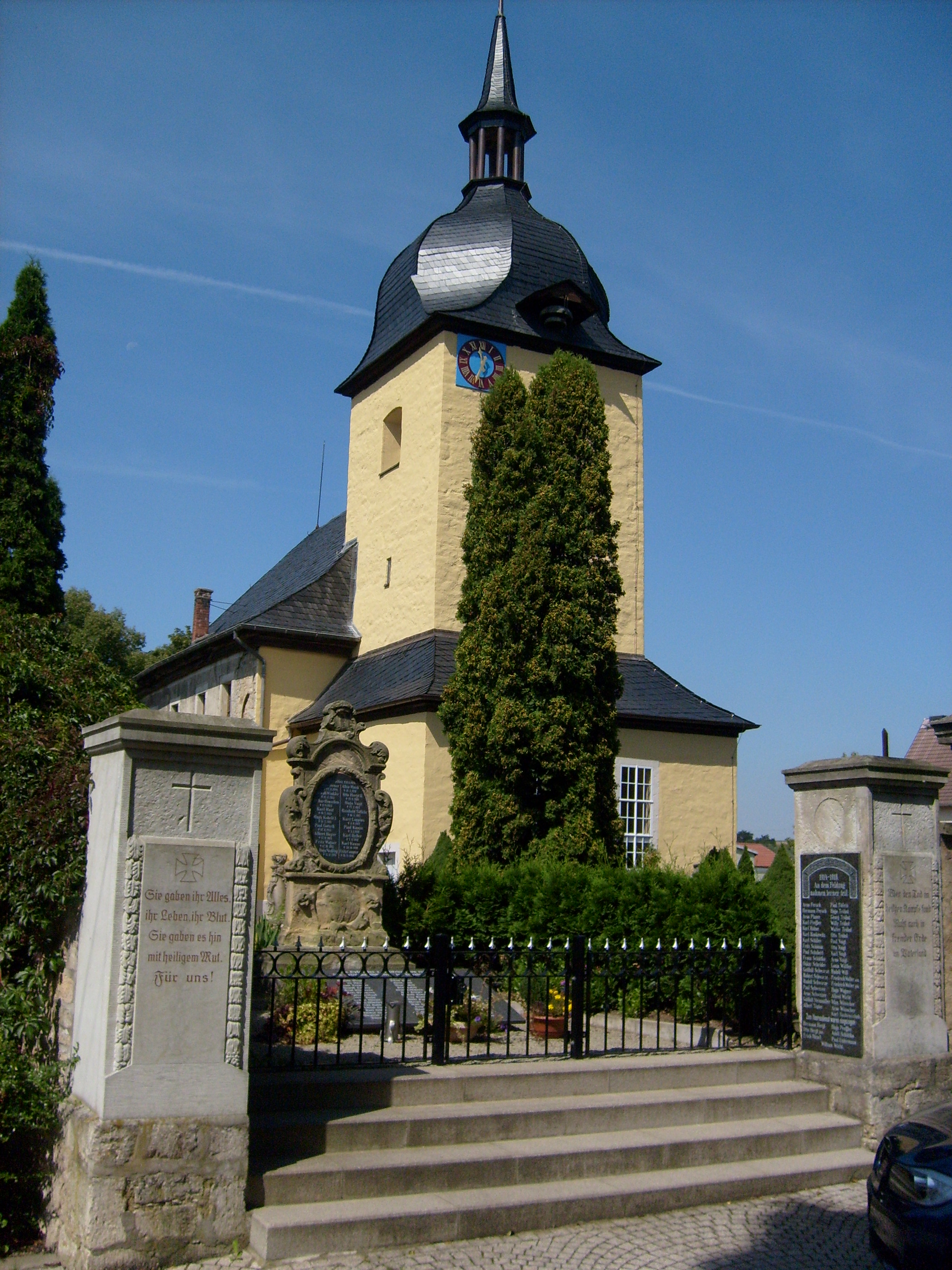 Marienkirche 2007